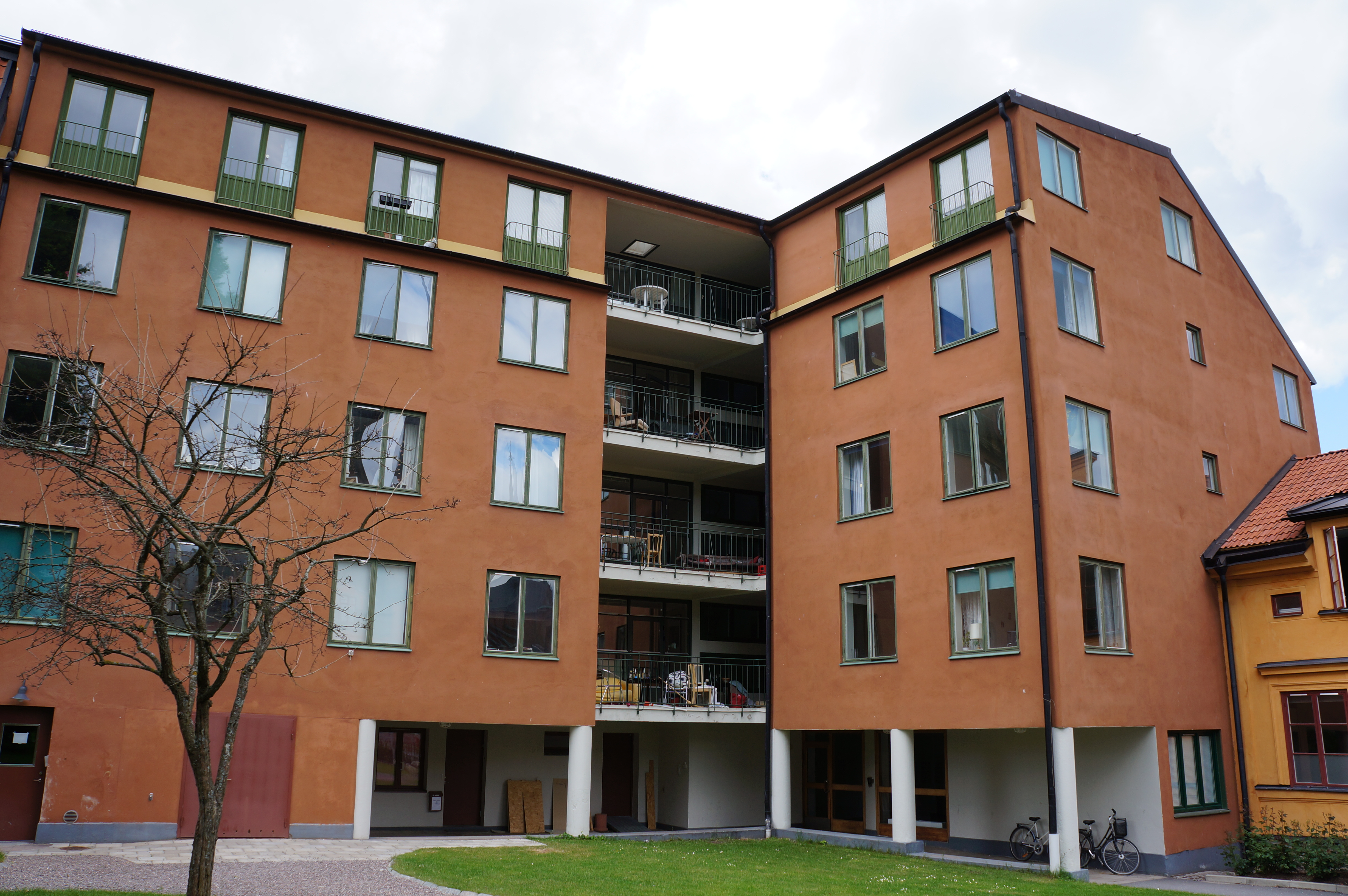 Arkadien, Södermnanlands-Nerikes nation